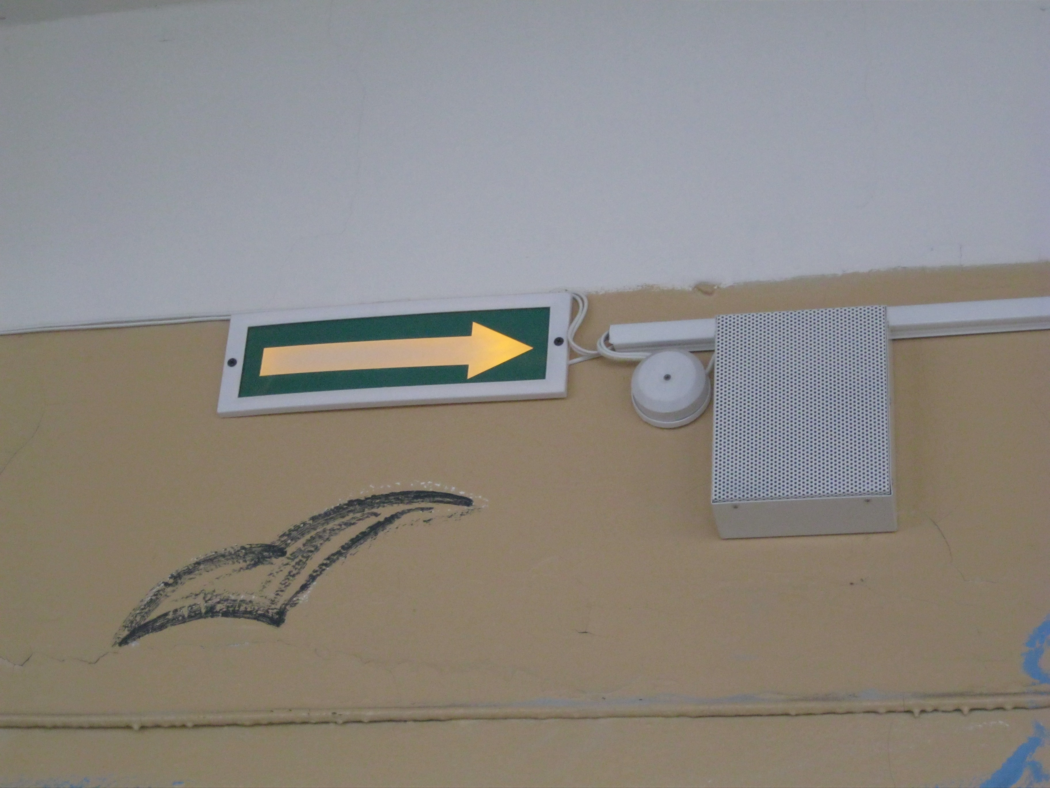 Пожарный указатель